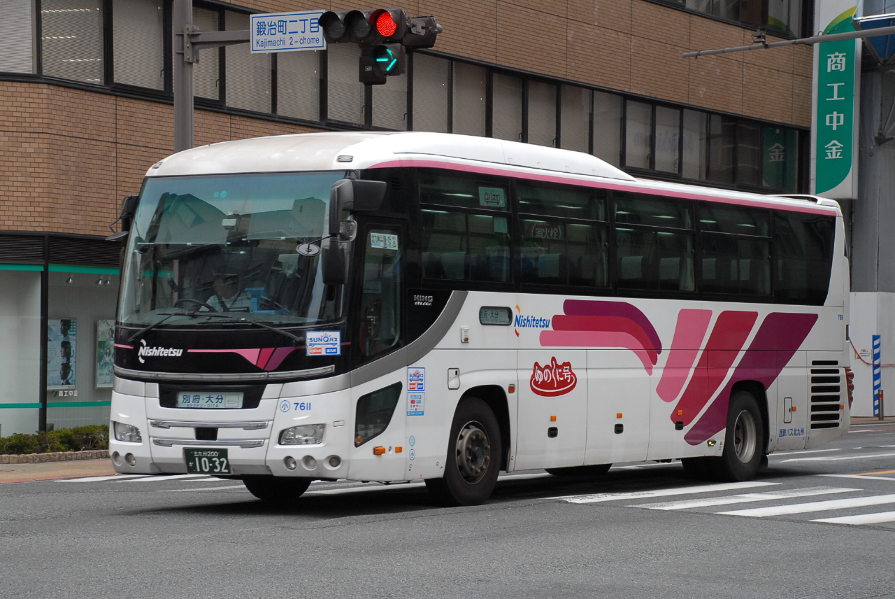 小倉北区にて撮影